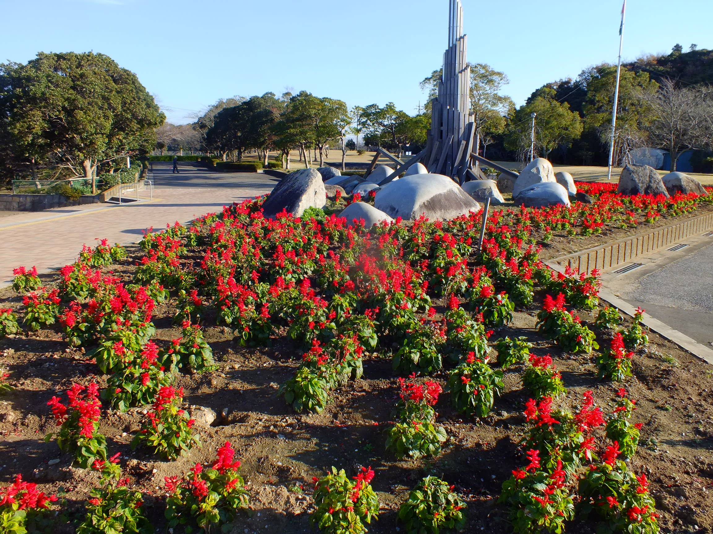 入園 無料 開園時間 常時開設 管理事務所 ８：３０～１７：００ 電話：0438-63-6560 住所 千葉県袖ケ浦市飯富２３６０